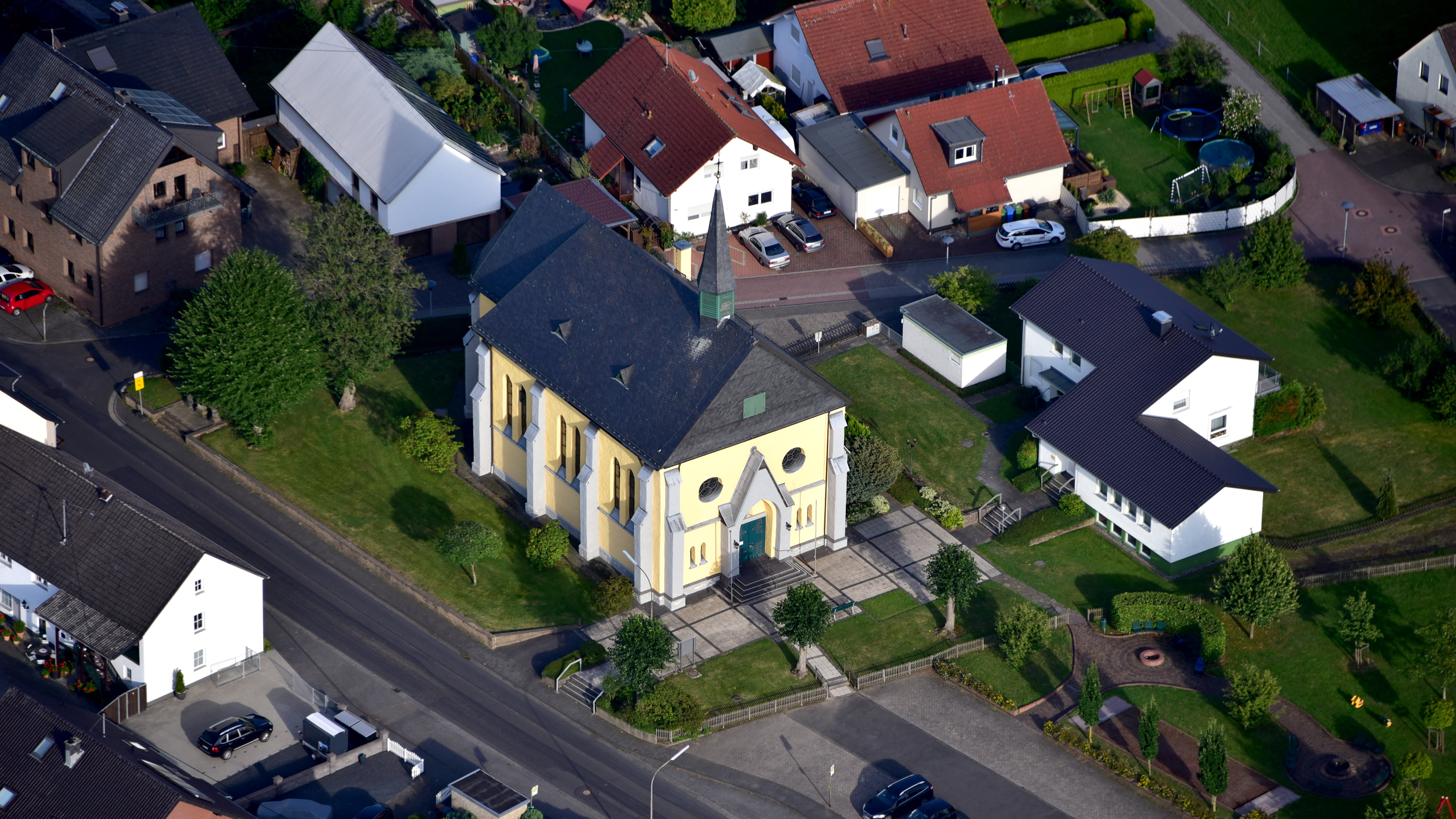 Katholische Rektoratskirche Maria Rosenkranzkönigin, Limbach, Gemeinde Asbach: Luftaufnahme (2019)